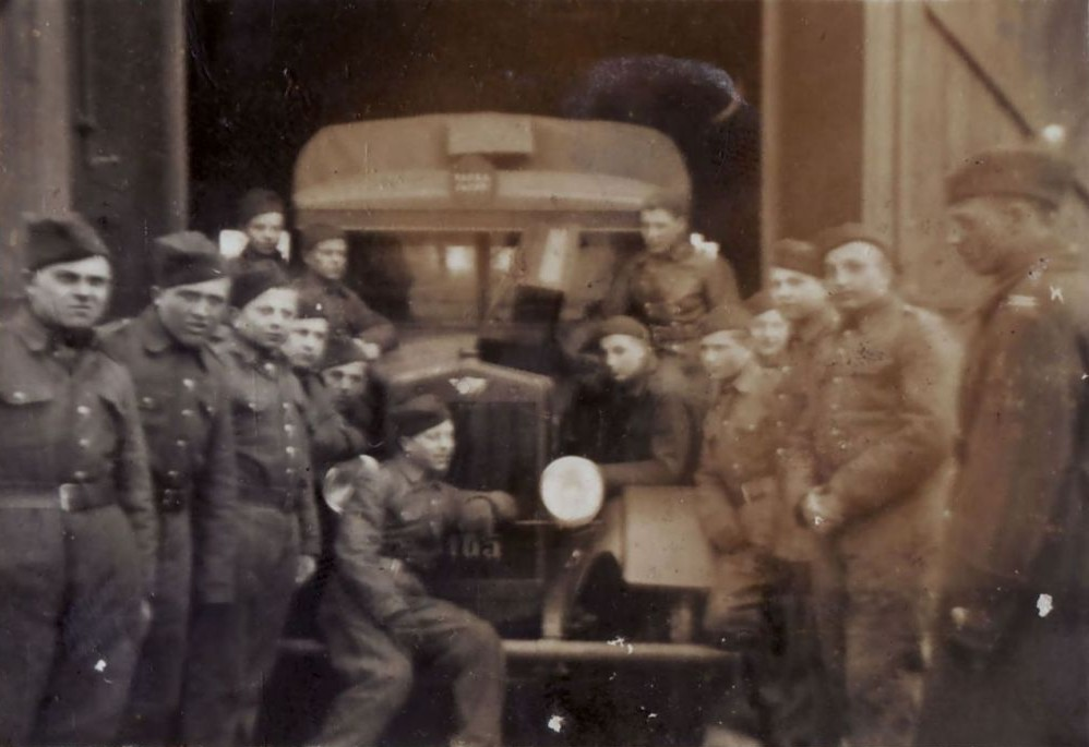 Żołnierze kadry 9 batalionu pancernego